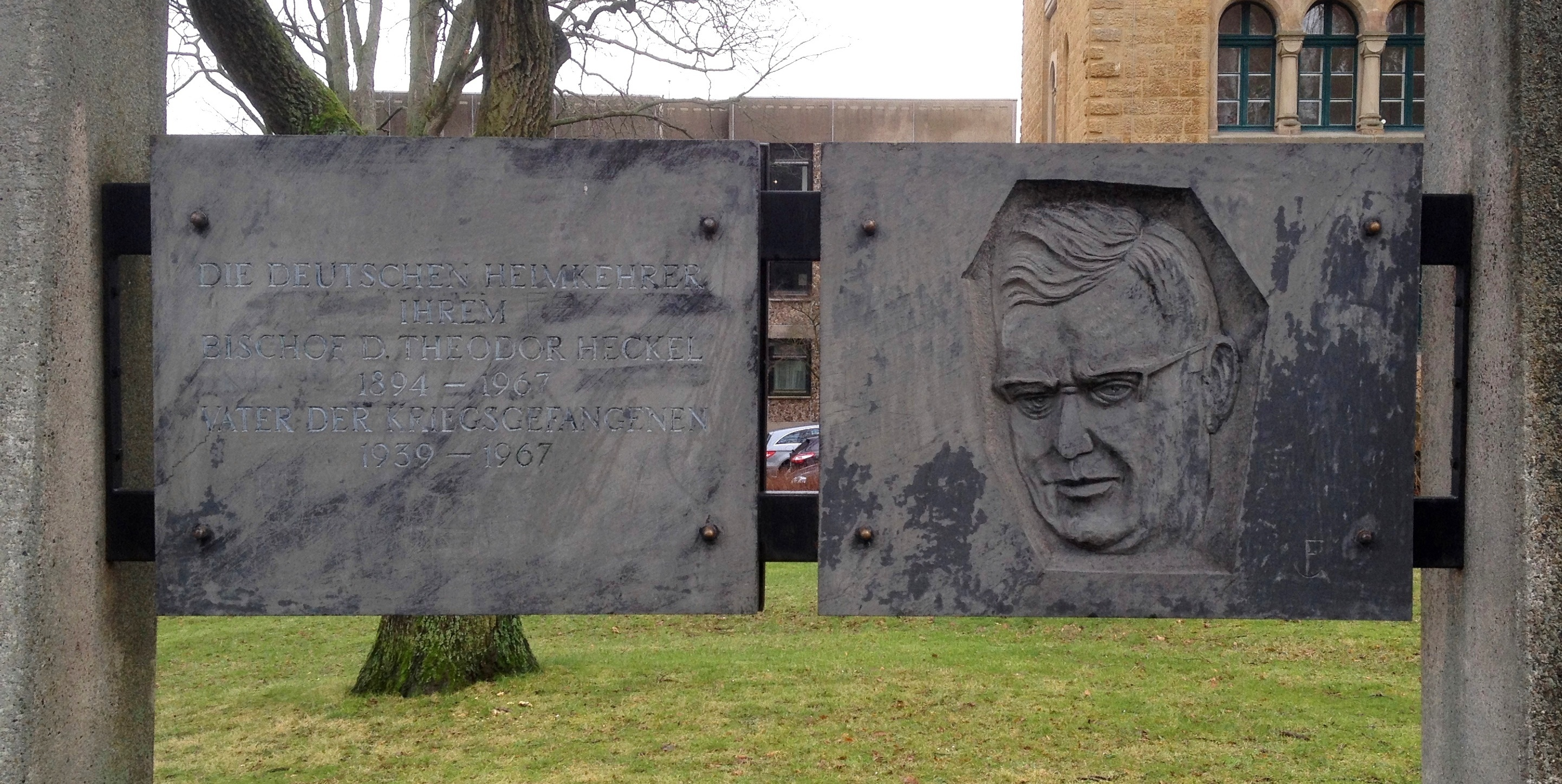 Goslar, Kaiserpfalzgelände, Gedenkstätte für Kriegsgefangenschaft und Vertreibung nach dem Zweiten Weltkrieg, Erinnerungstafel Bischof Theodor Heckel Die deutschen Heimkehrer ihrem Bischof D. Theodor Heckel 1894-1967 Vater der Kriegsgefangenen 1939-1967